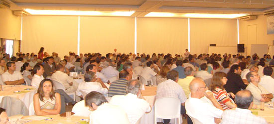 Vista general de la sesión de trabajo del "Plenario Ciudadano del 17 de diciembre".